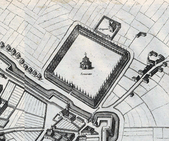 Lazzaretto di Milano nella carta di Milano del 1704